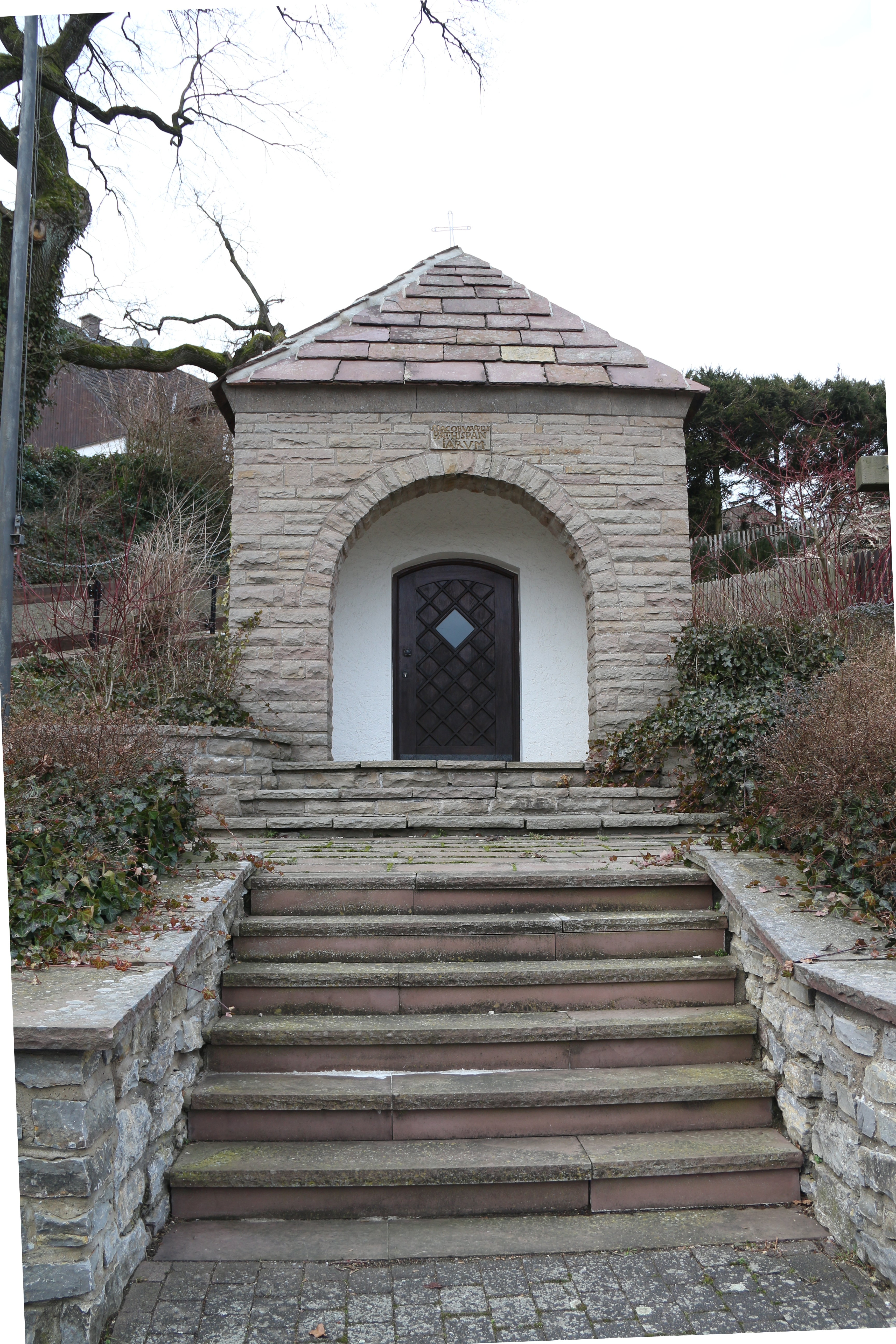 Jakubuskapelle. Die hist. Kapelle wurde 1953 abgerissen und neue erbaut. Der Stein über dem Portal mit der Inschrift "St. Jacobus Apostolus Patronus Hispaniarum" stammt von der Vergängerkapelle. Dem Brunnen neben der Kapelle werden Heilkräfte zugesagt.